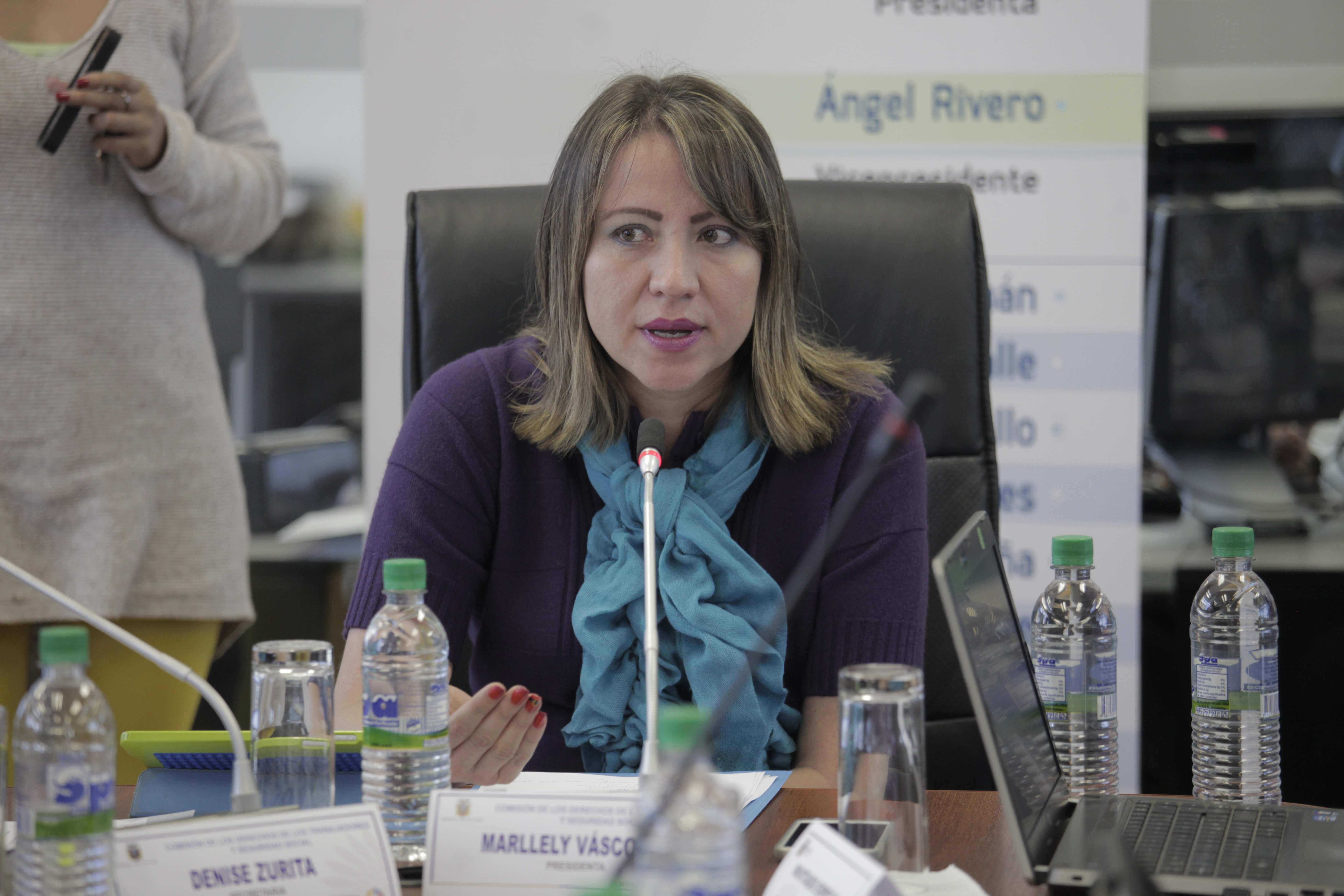 Tema: Proyecto de Ley Reformatoria al Código del Trabajo. Fotografía: Alberto Romo/Asamblea Nacional